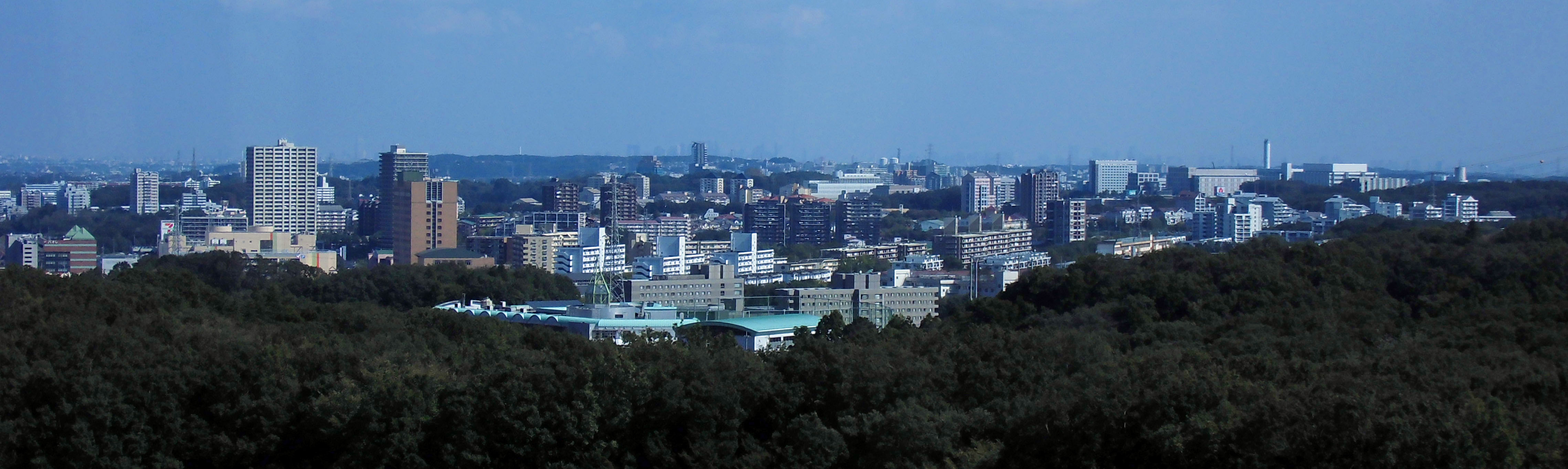 多摩ニュータウンの全景（2013年10月12日撮影）